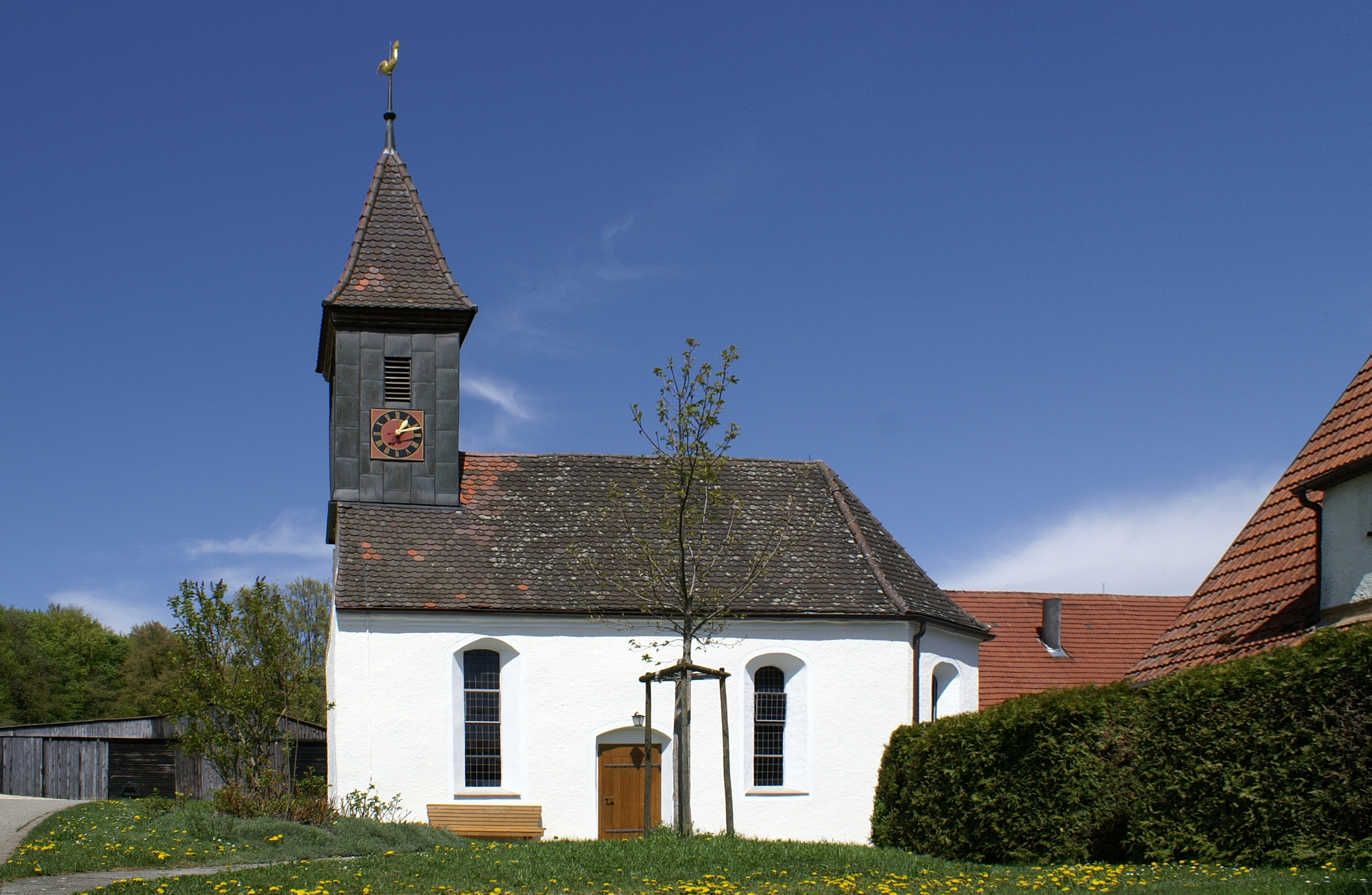 Kirche St. Christoph u. Margarethe in Treffensbuch auf der Schwäbischen Alb